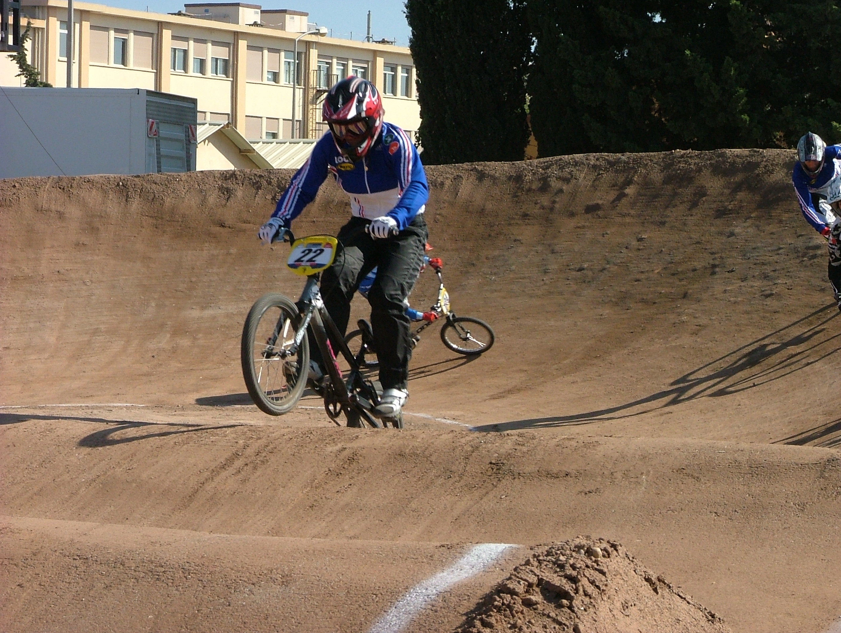 22 Laëtitia Le Corguillé (Francia)